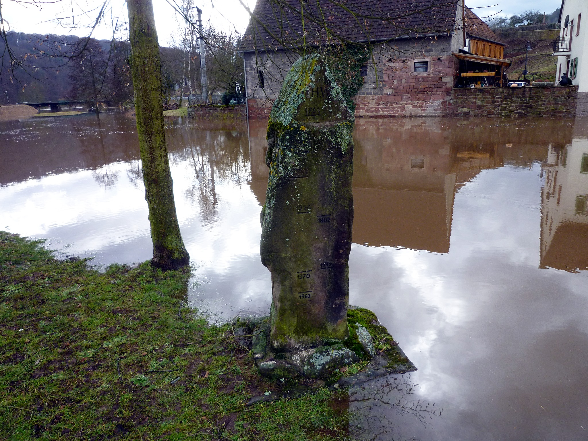 Hochwasserstein in Gräfendorf, Schondra/Fränkische Saale, ca. 4,75 m am Pegel Wolfsmünster (